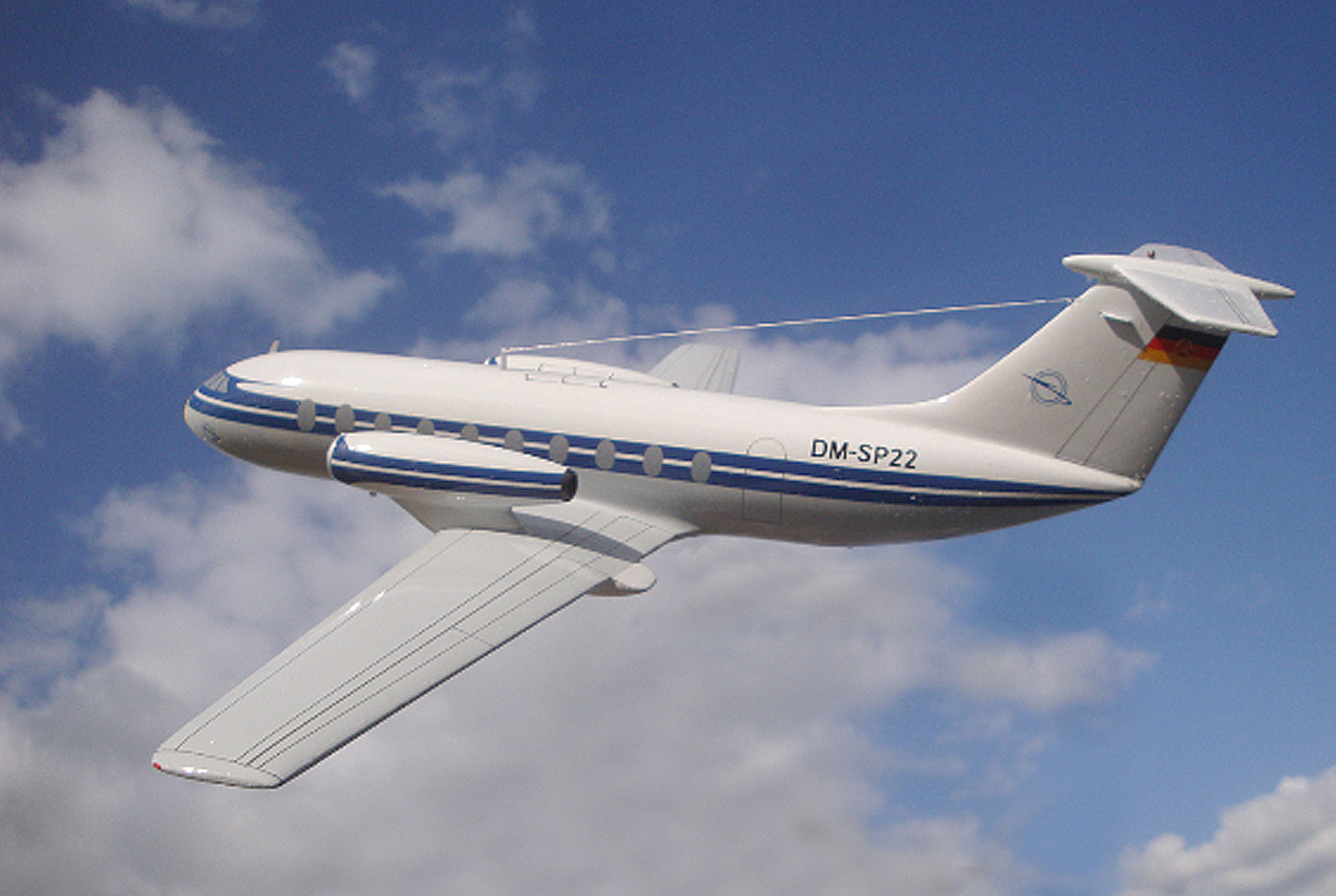 Die kleinere 155, das Modell zeigt den letzten Entwurf SP-22 (siehe VFW 614, Erstflug 14. Juli 1971, 19 Auflagen, darunter drei Prototypen), sollte als schneller Zubringer die Il-14 ersetzen, und auch von unbefestigten Pisten aus agieren, geplanter Erstflug 1964. Siehe Ausstellung zum Thema 152 im FIZ Gellmersdorf, eingerichtet von Wilfried Bergholz.